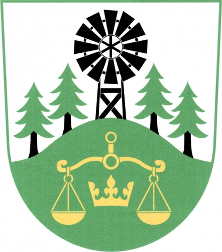 znak, Chlum, okres Třebíč